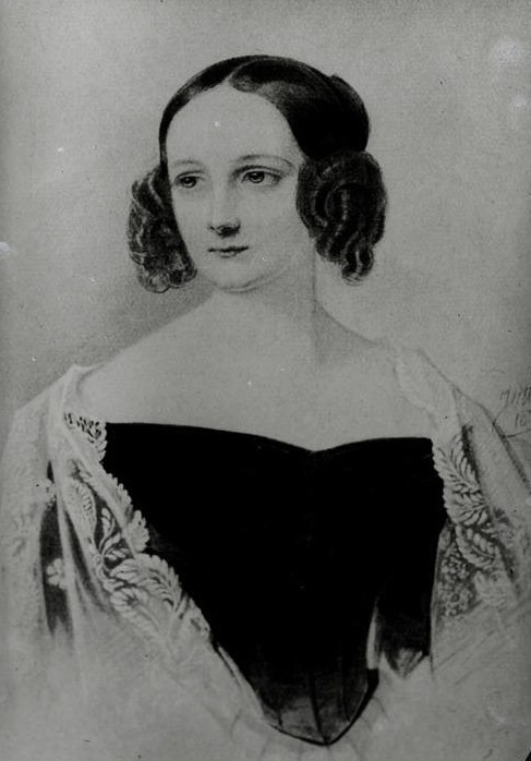 Елизавета Васильевна Врангель, урожденной баронессы Россильон (1810—1854)